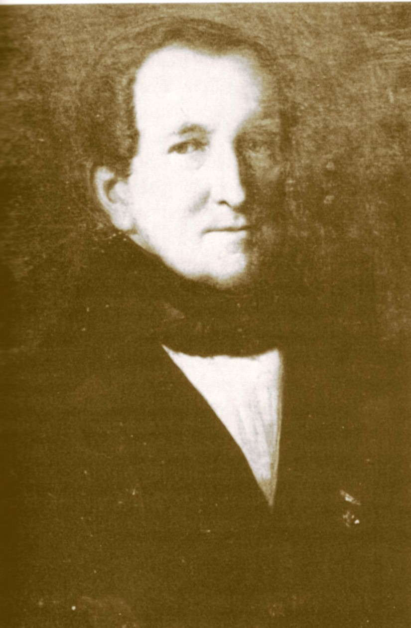 Ignatz von Landsberg